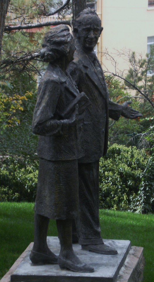 İsmet ve Mevhibe İnönü heykeli, Metin Yurdanur tarafından yapılmıştır, Pembe köşk bahçesi, Ankara.